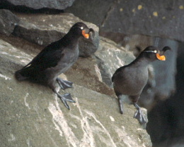 Crested Auklet public domain from USFWS Slika:Crestedauklet41.jpg